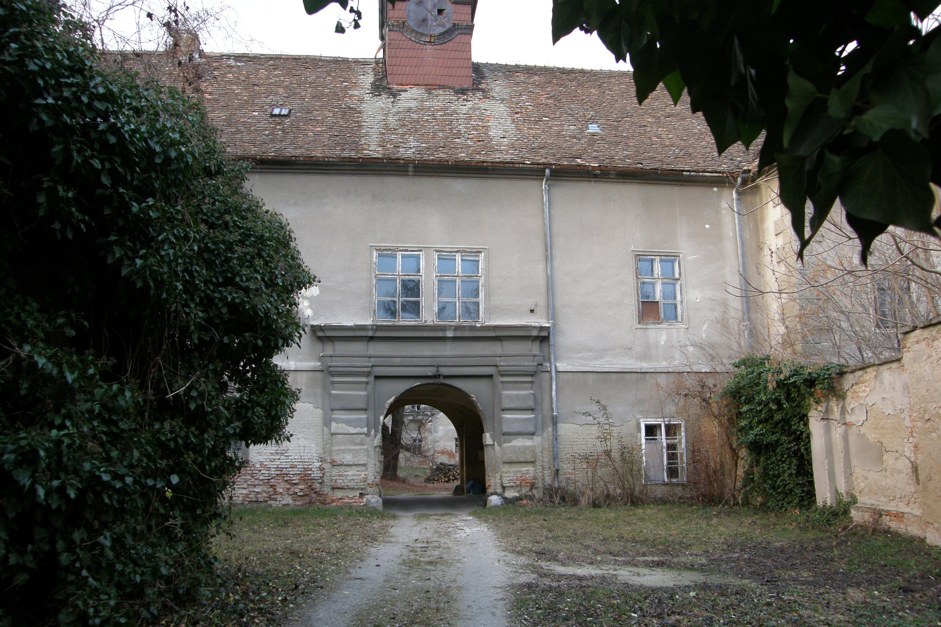 Schloss Rabensburg, der Ehrenhof